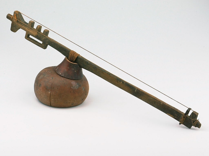 Deze eensnarige stokciter heeft een klankkast van kalebas. Aan het linker-uiteinde van de staaf zit tussen de onderste snaar een stukje hout geklemd. Wegner vermeldt (blz.30) dat een dergelijk stukje hout aangebracht wordt om de snaar van de stok weg te houden zodat hij kan klinken; dan zou het hier gaan om een tweesnarige (poly-heterochorde) stokciter. De bovenste snaar wordt verkort door deze met een vinger op een van de drie uitsteeksels te drukken; de onderste snaar zou dan mogelijk een 'bourdon' functie hebben.